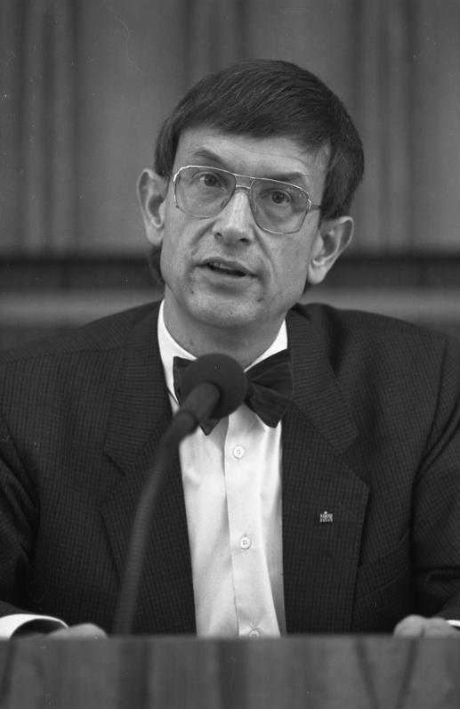 29.9.1987 Pressekonferenz mit Bundesminister für Forschung und Technologie Dr. Heinz Riesenhuber und Bundesministerin für Jugend, Familien, Frauen und Gesundheit Prof. Dr. Rita Süssmuth zur Tagung des Nationalen Aids-Beirats im Saal der Bundespressekonferenz.